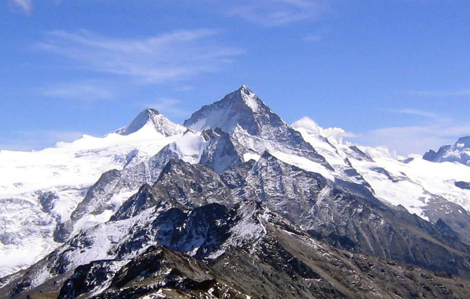 la dent blanche depuis l'arète du sassenère, évolène, valais, suisse